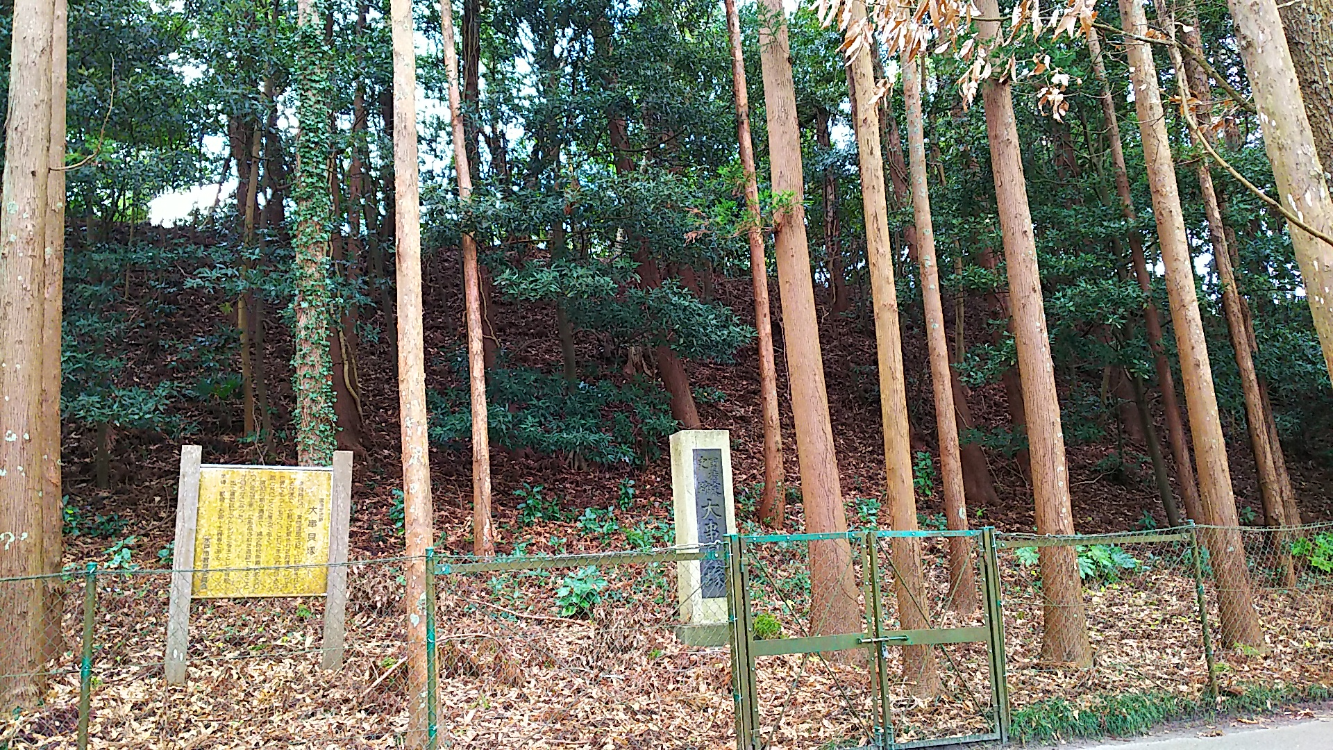 茨城県水戸市の大串貝塚。碑石建立場所。